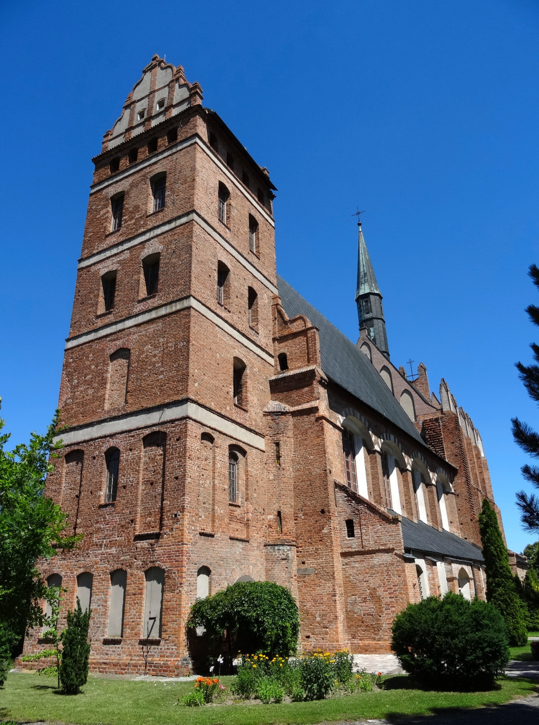 Najstarszy kościół farny w Świeciu, pw. św. Stanisława Biskupa i MB Częstochowskiej (XV-XVII w.)